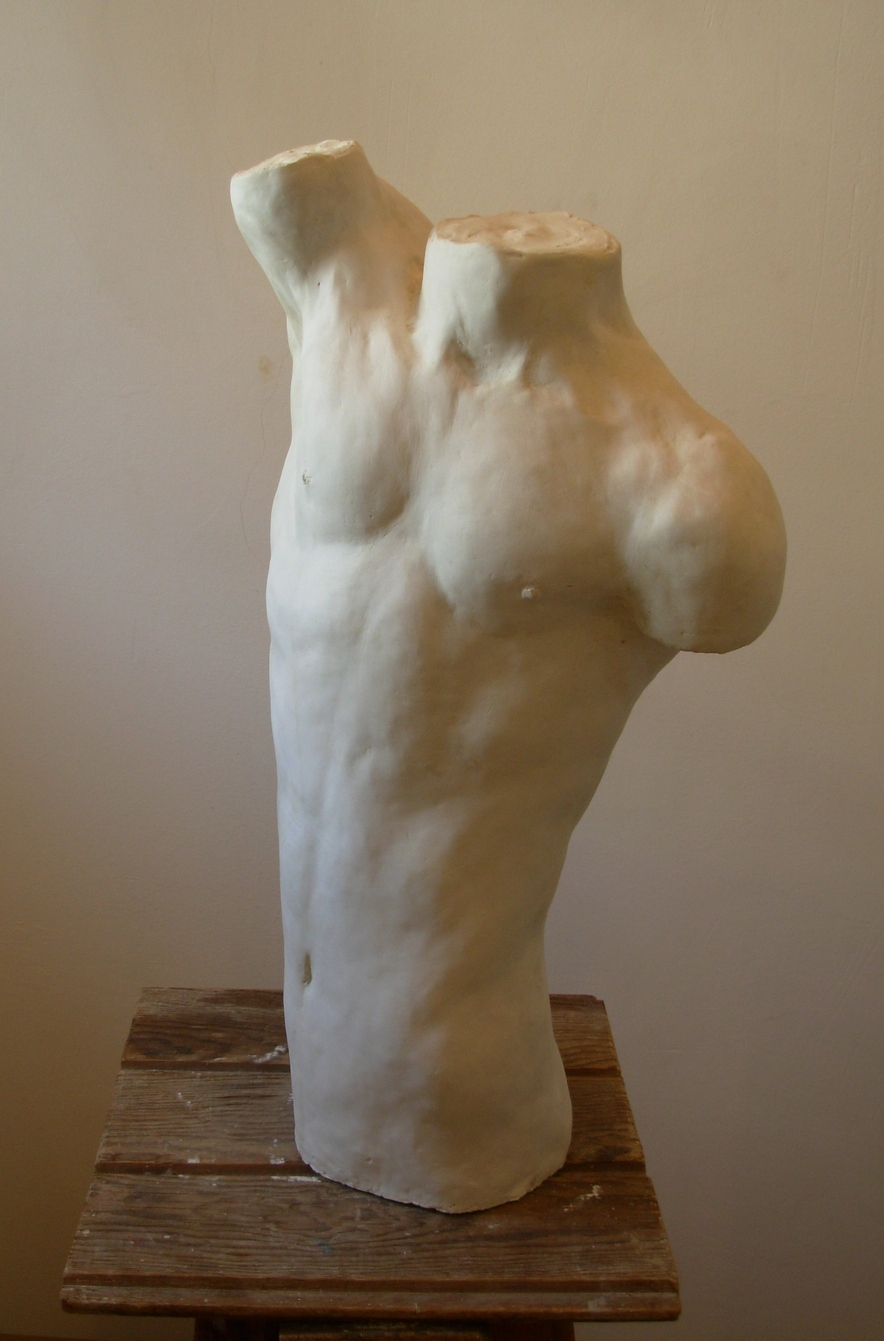 Srpski (latinica): Vladislava Krstić torzo-10.-2013.-gips-51x26x17-cm